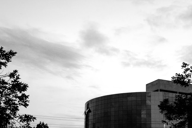 Prédio da Procuradoria-Geral do Distrito Federal